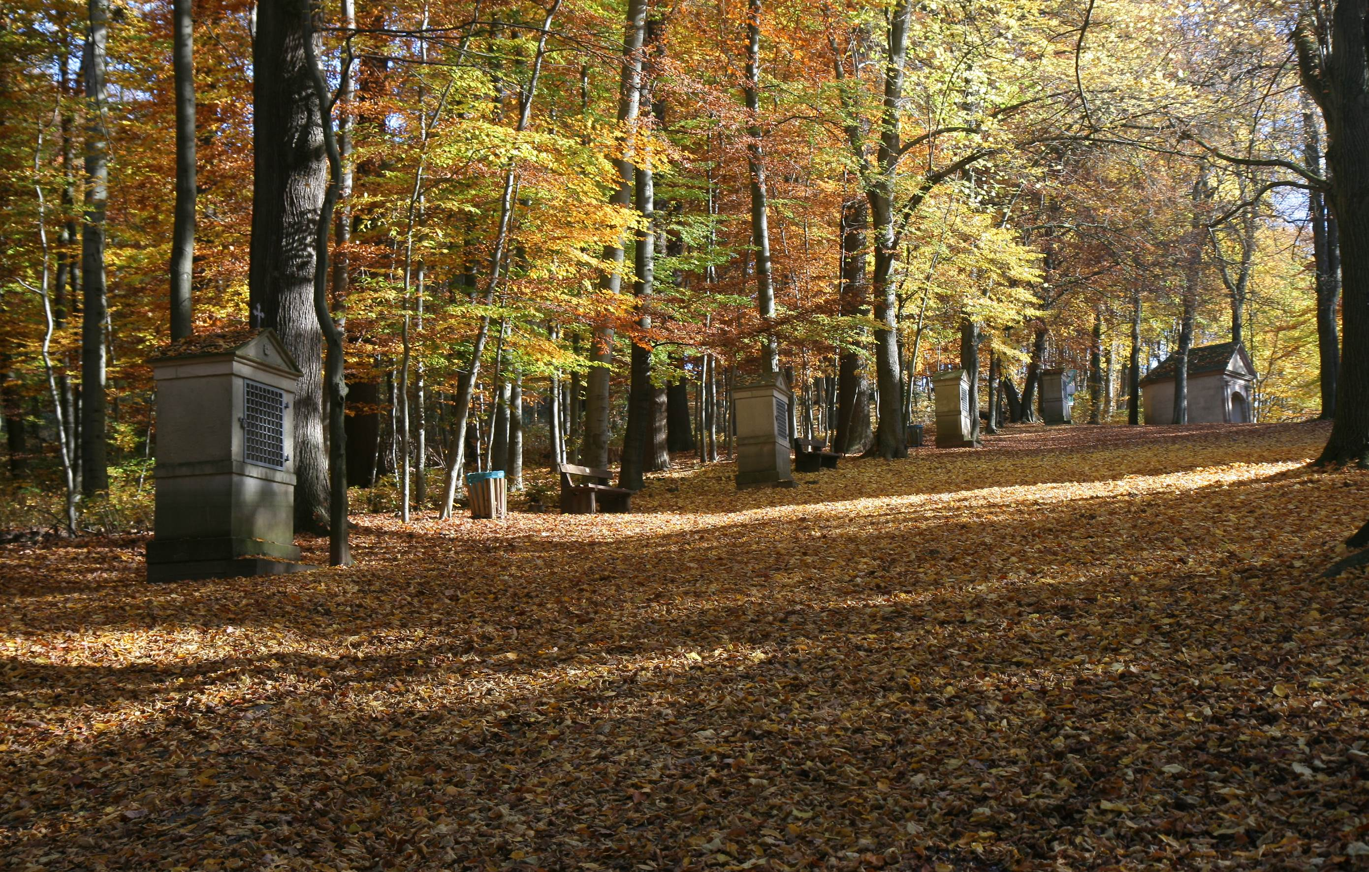 Kreuzweg auf dem Rodenberg in Menden, Rodenberg. This image shows a heritage building in Germany, located in the North Rhine-Westphalian city Menden (Sauerland) (no. 39).